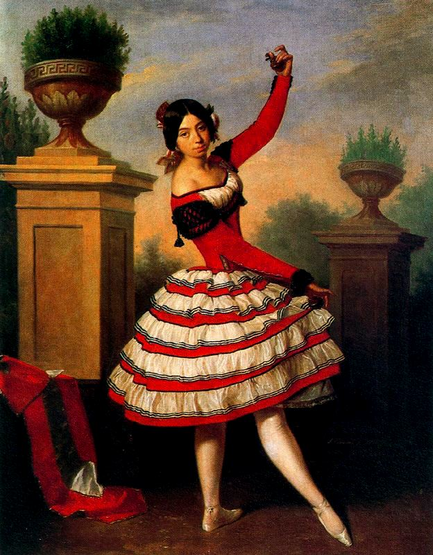 La bailaora Josefa Vargas